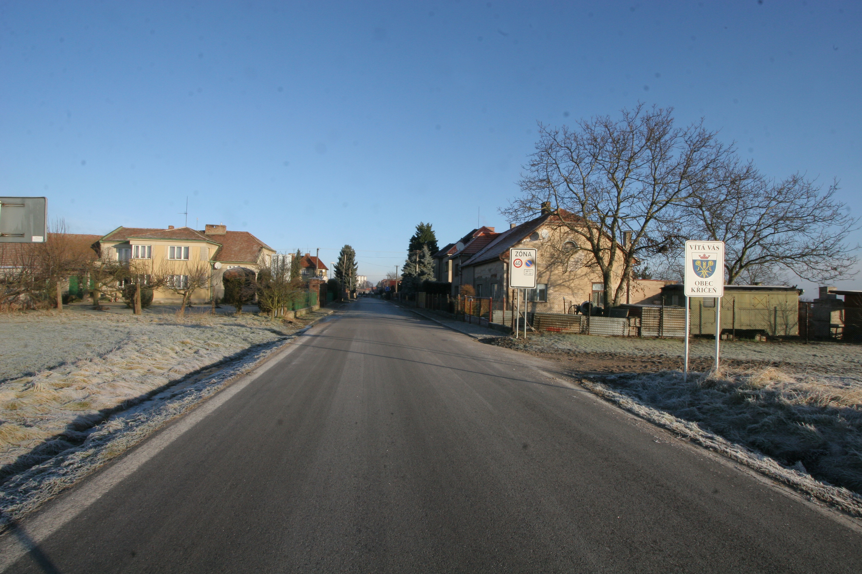 Křičeň - příjezd od Lázní Bohdaneč